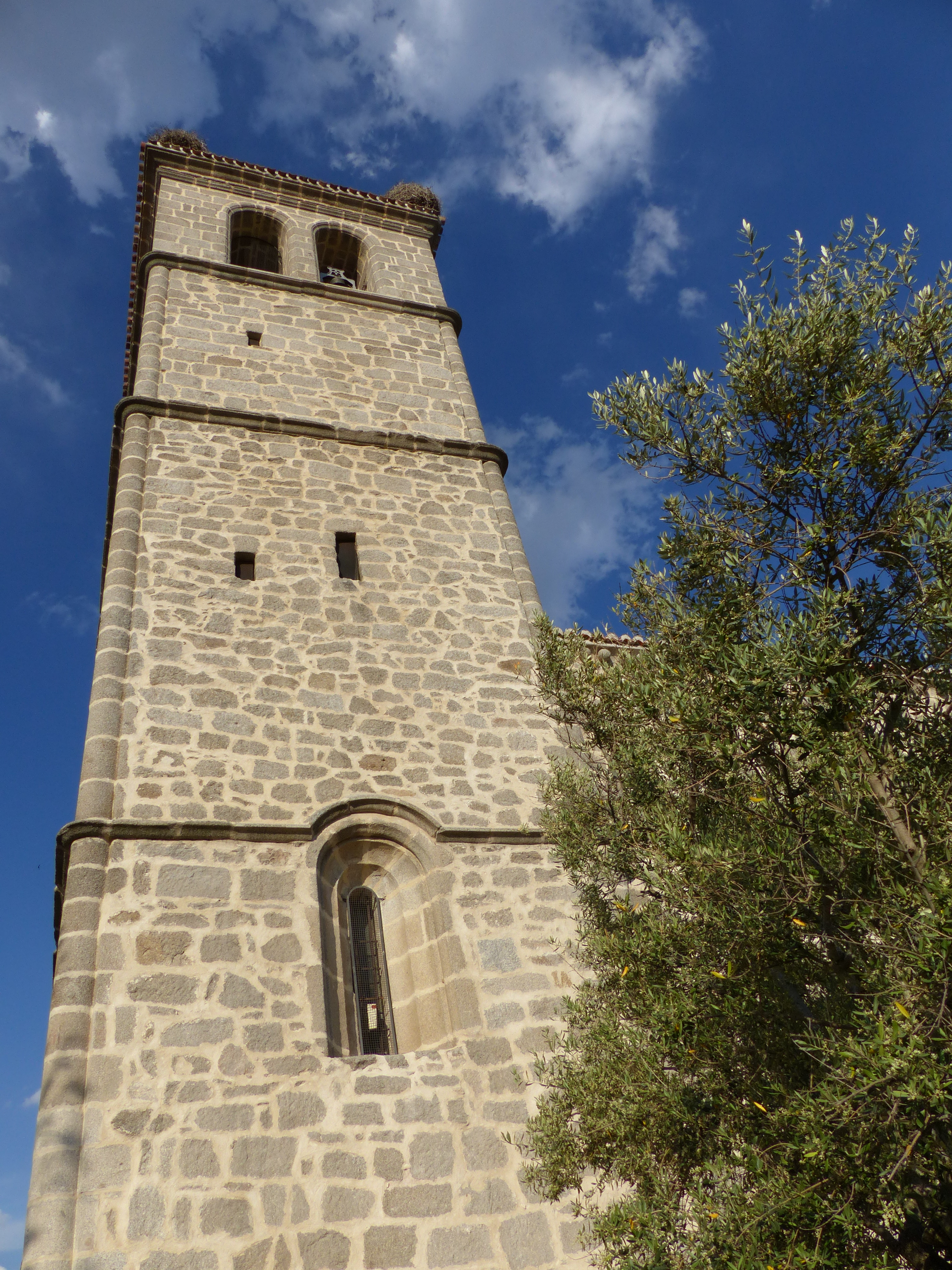 Torre Iglesia de Cerceda